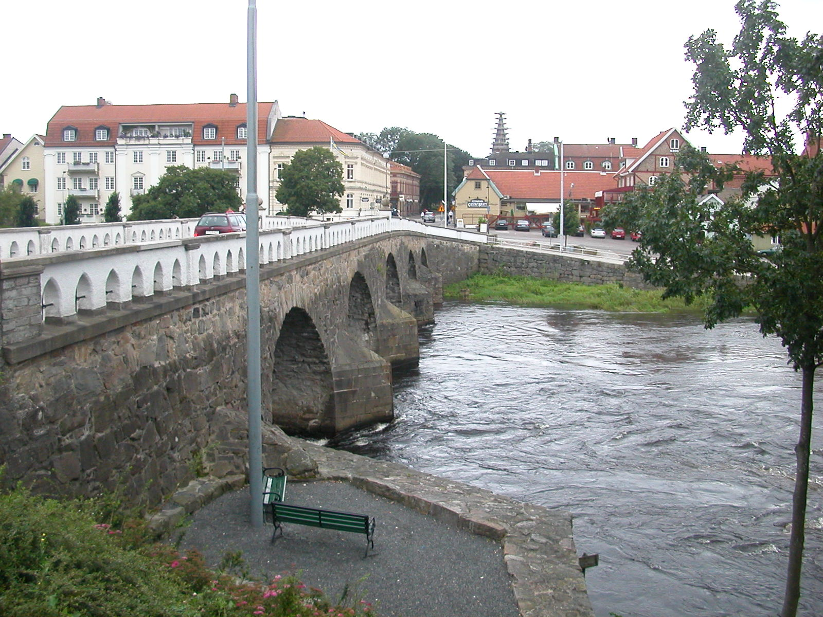 Tullbron, Falkenberg, Sverige.